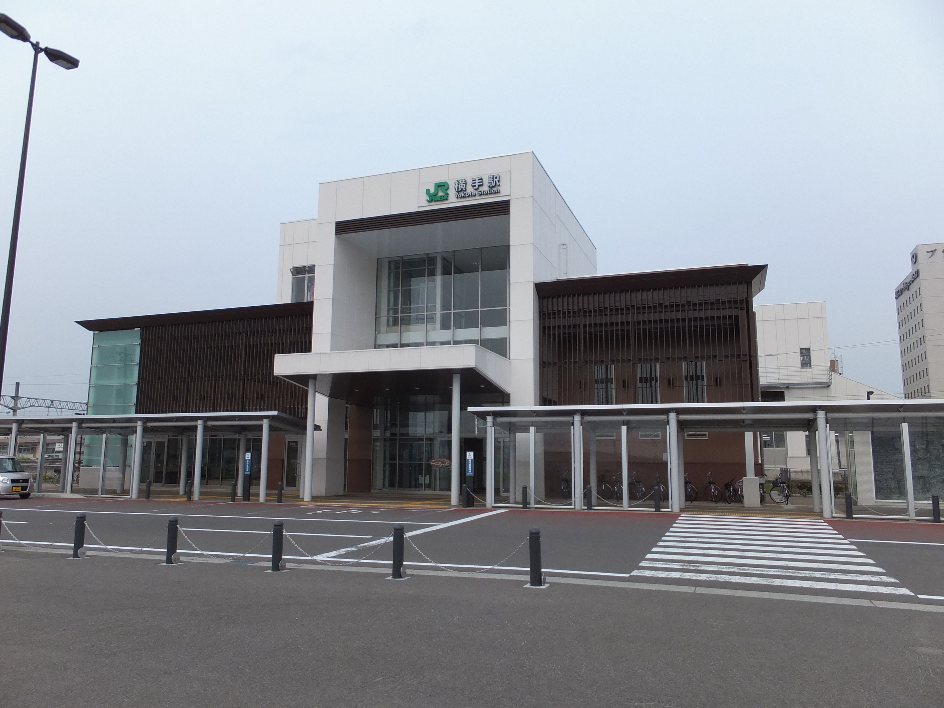 横手駅西口